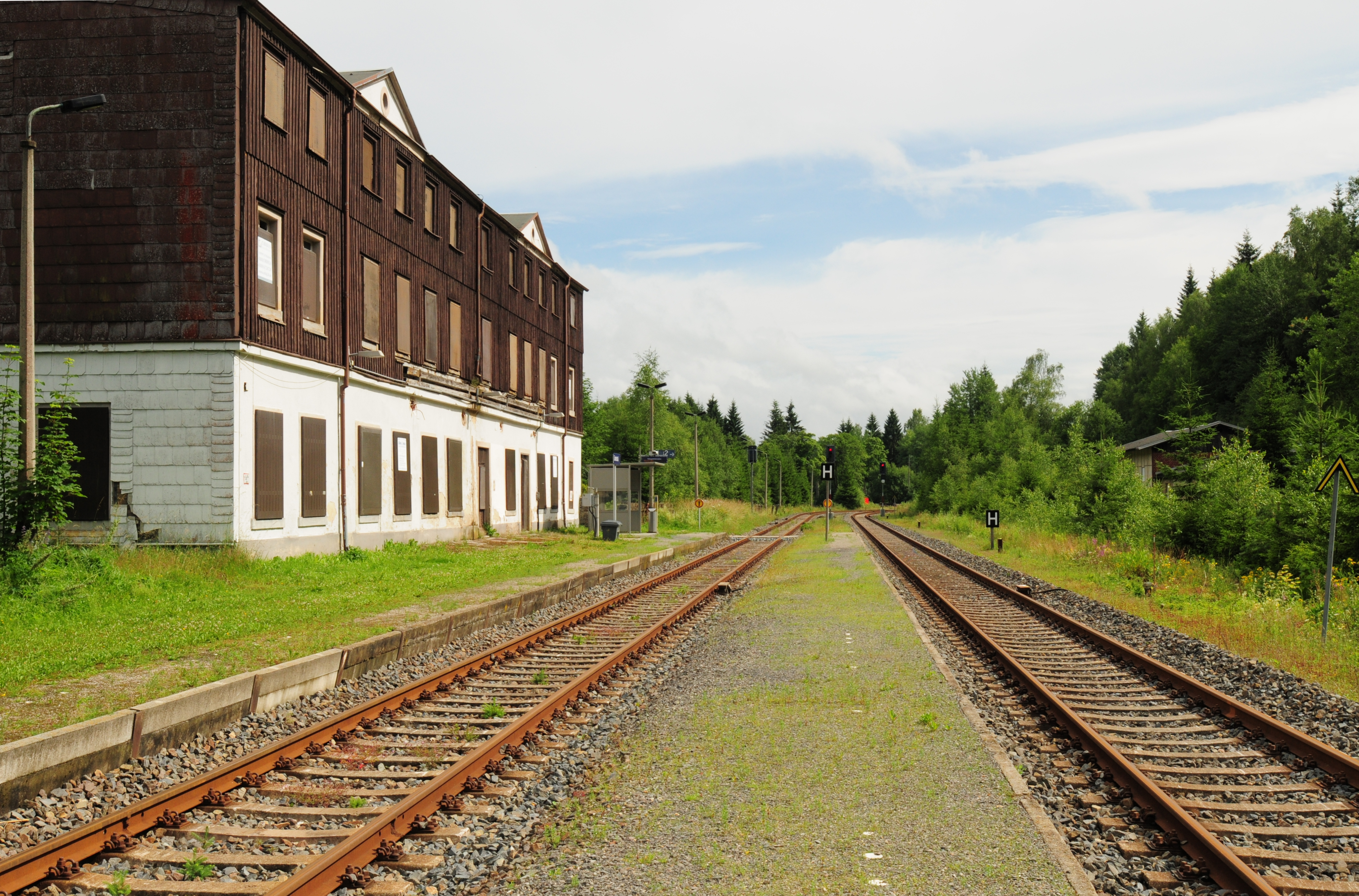 Zwotental (Gunzen, Gemeinde Schöneck), Bahnhofsanlagen an der Bahnstrecke Chemnitz–Adorf (Vogtlandkreis, Sachsen, Deutschland)